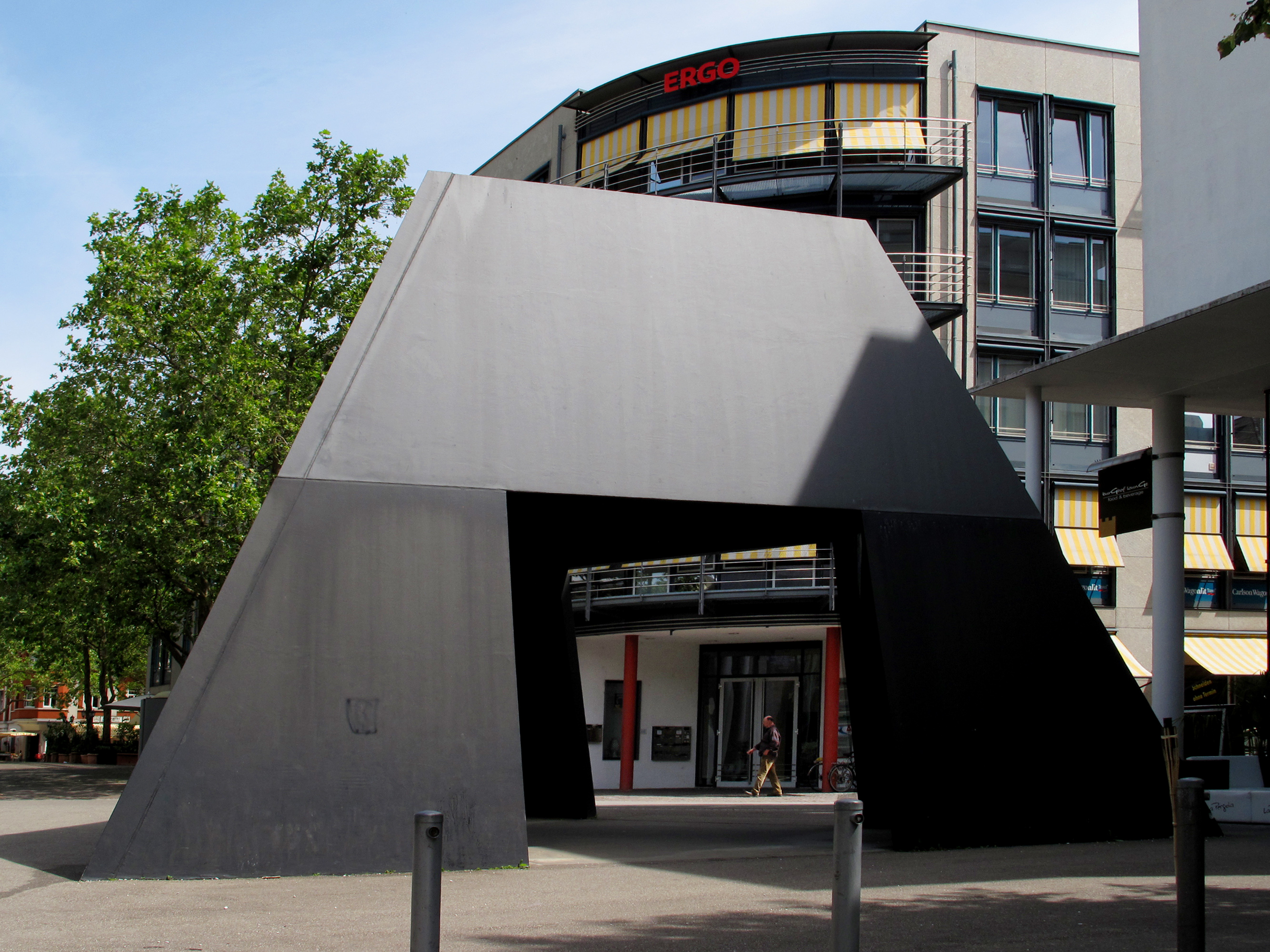 Bruce Nauman, Truncated Pyramid Room, 1982-98, - Deutschland, Baden-Württemberg, Lörrach, Skulpturenweg